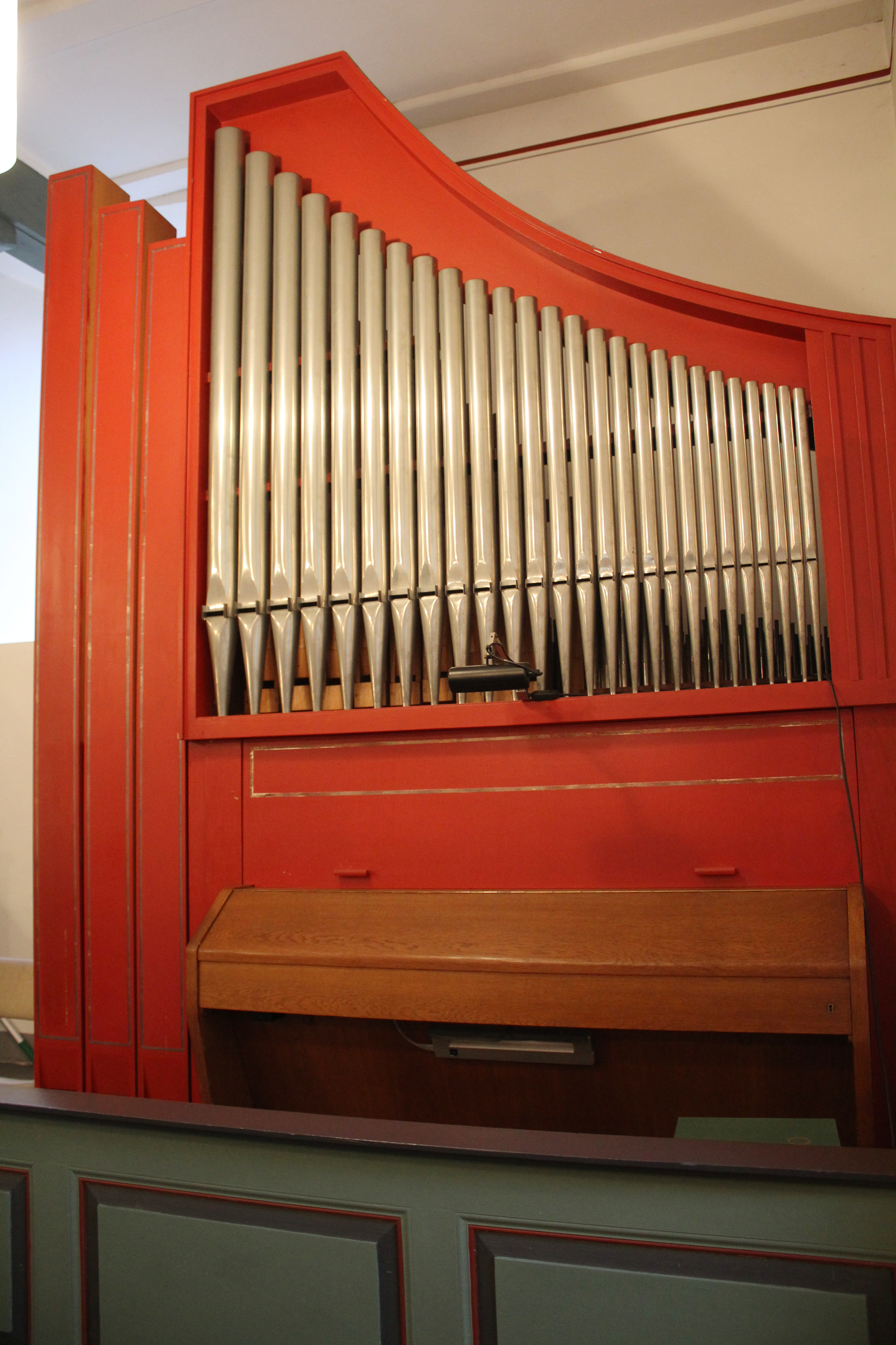 Evangelische Kirche Wolfshausen, Weimar/Lahn, Landkreis Marburg-Biedenkopf, Hessen, Deutschland